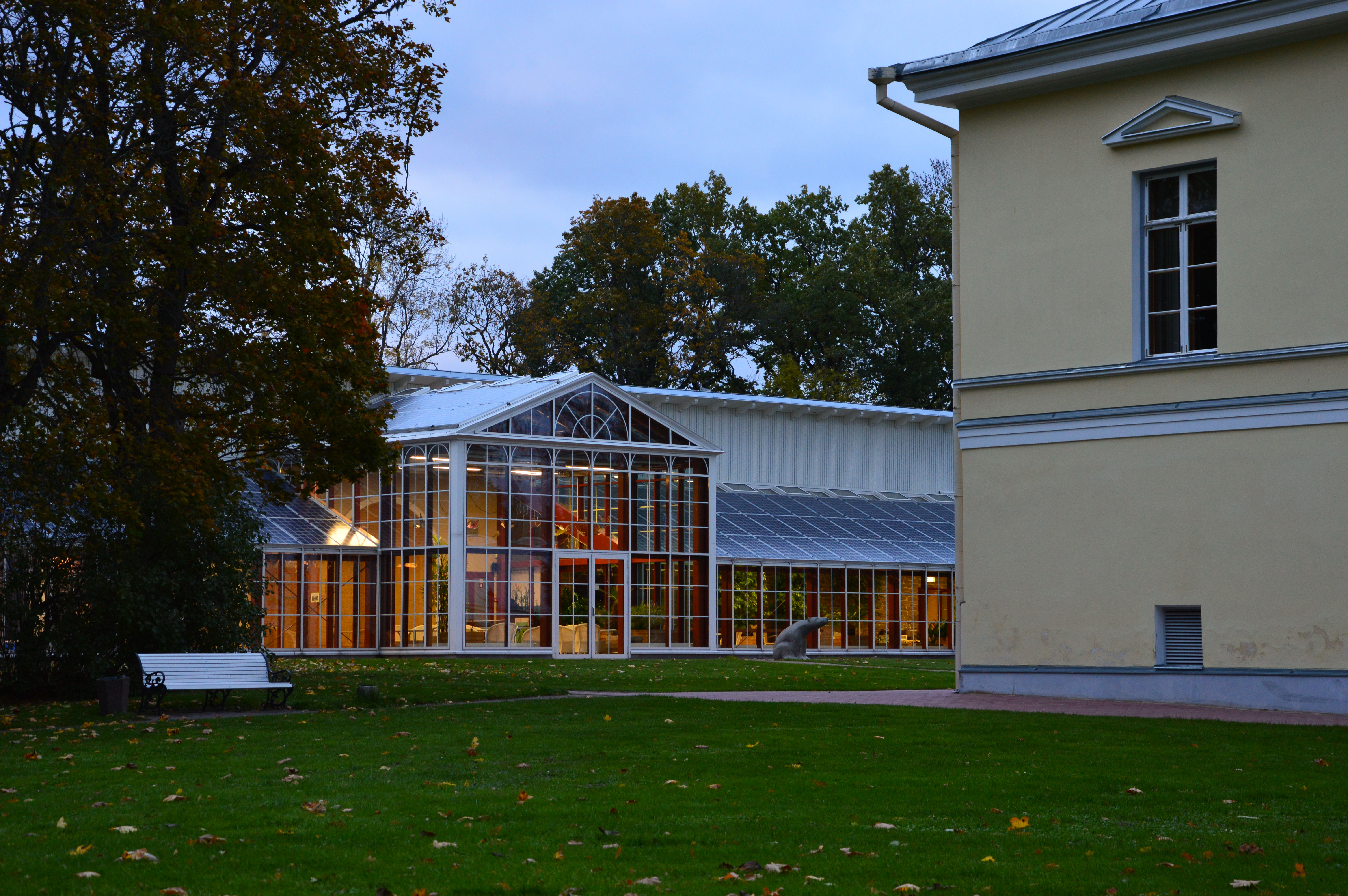 Mäetaguse mõisa kasvuhoone